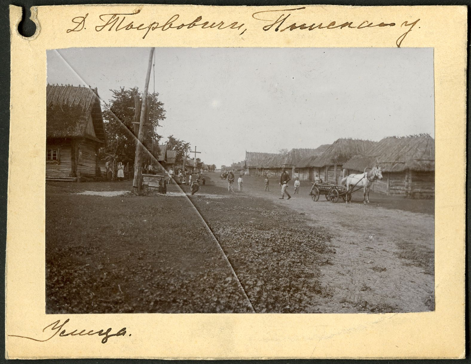 Беларуская (тарашкевіца): Тырвовічы (Tyrvovičy). Царква